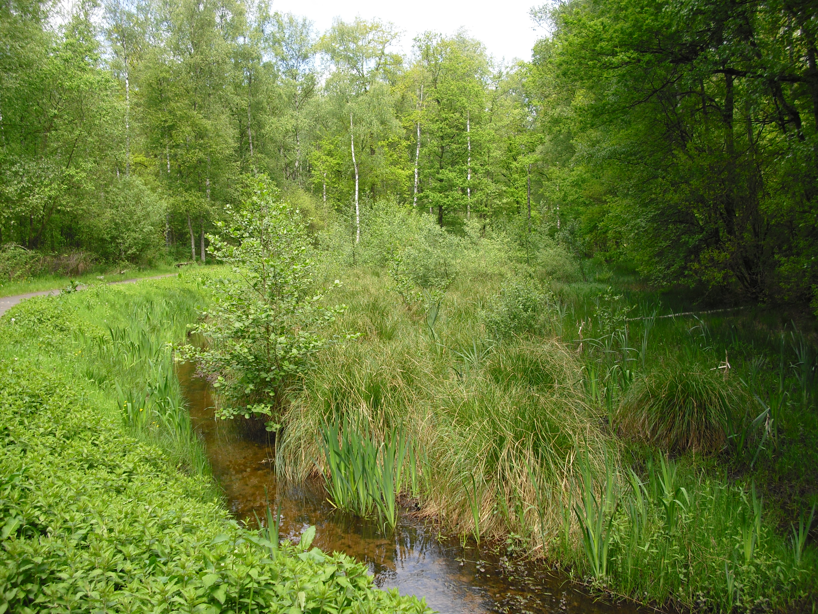 Raakmoor